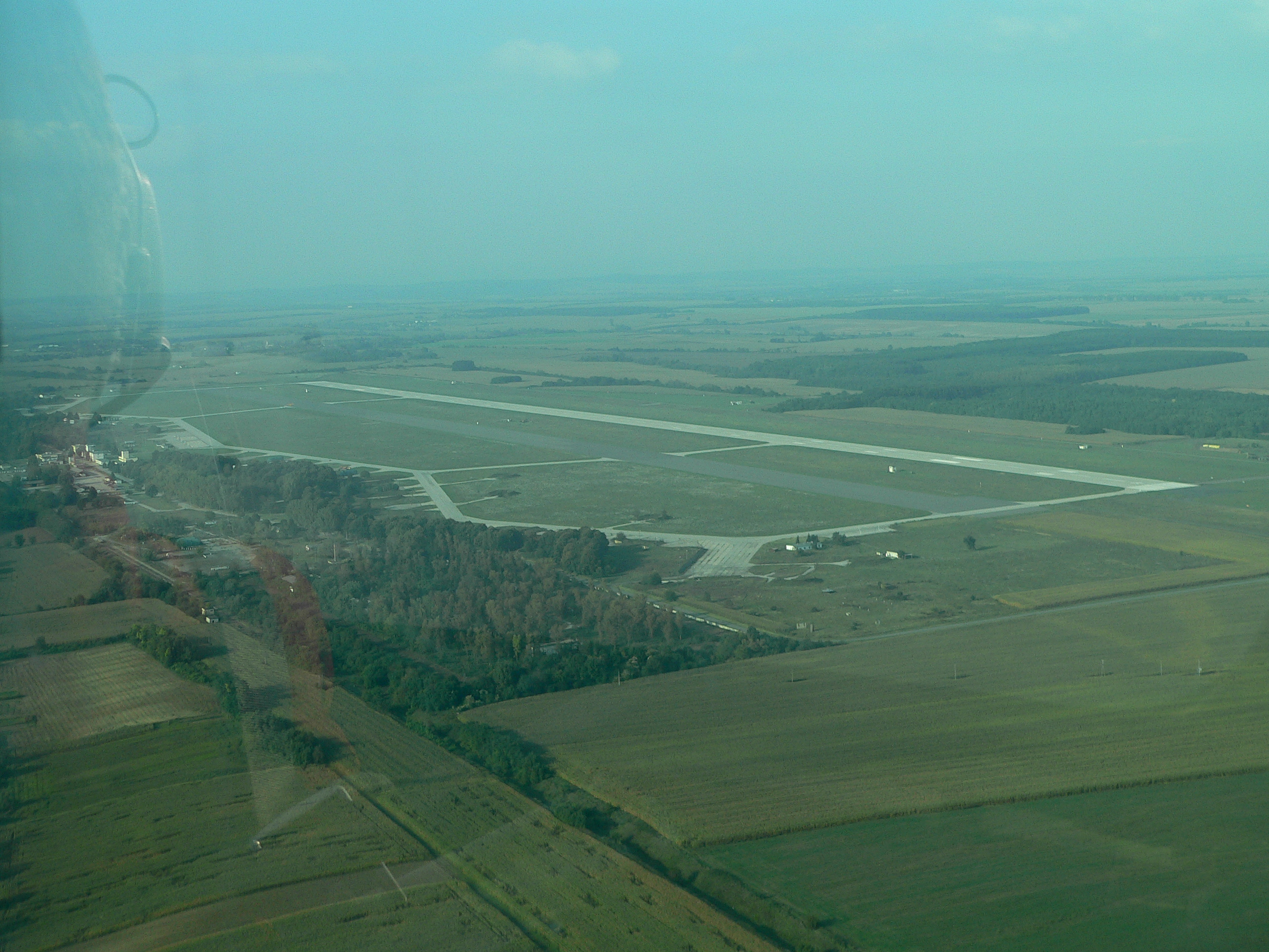 A taszári repülőtér a levegőből Képet készítette: Nemes András